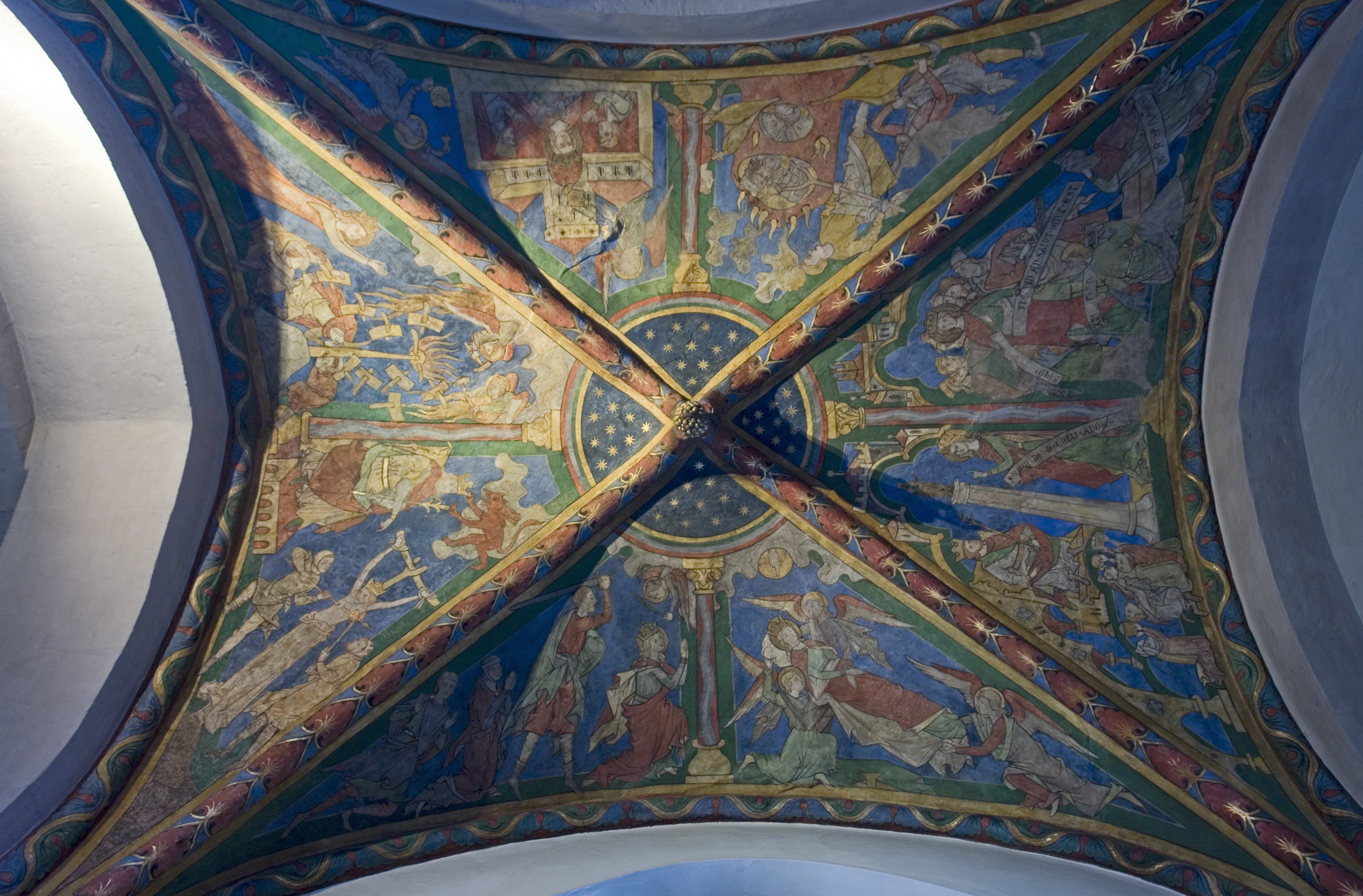 St. Maria Lyskirchen, Fresken der südlichen Seitenkapelle